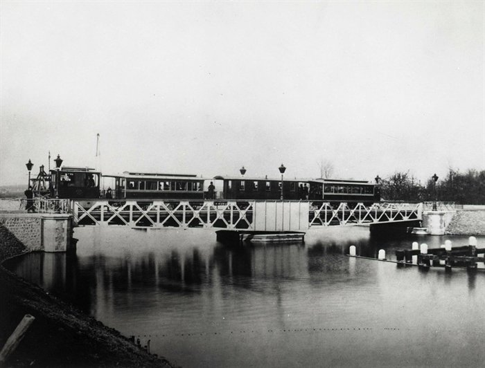 Foto van een proefrit van Rijkswaterstaat van de stoomtram Utrecht - Vreeswijk op de Liesboschbrug over het Merwedekanaal. Vervaardiger onbekend. Gelet op artikel 38 van de Auteurswet 1912 en de nadere invulling daarvan zoals verduidelijkt onder punt 1.1.5.12 van de Juridische wegwijzer archieven en musea online en de discussie hier is het auteursrecht op deze afbeelding vervallen vanaf 1 januari 1959.